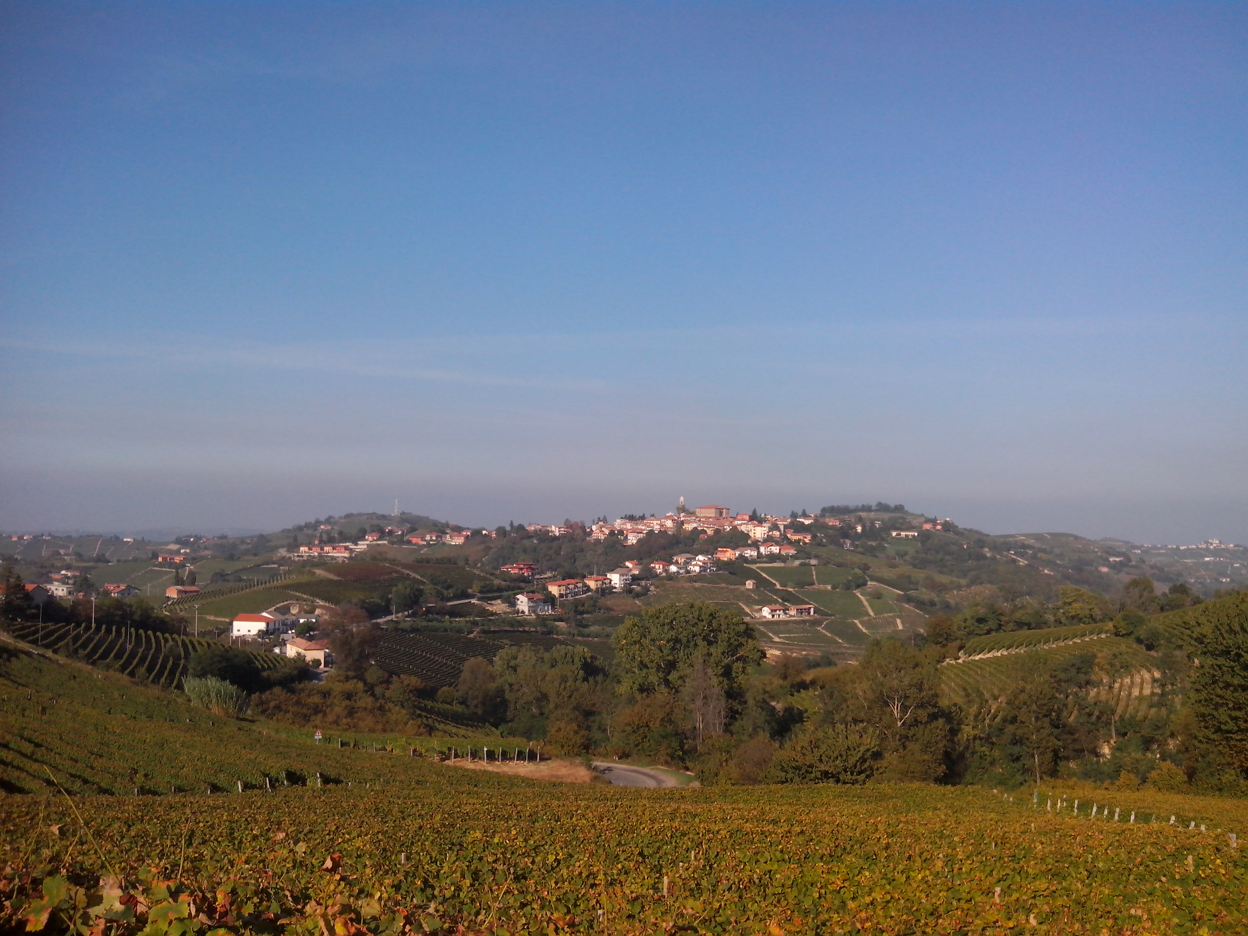 comune di mango tra le colline delle langhe